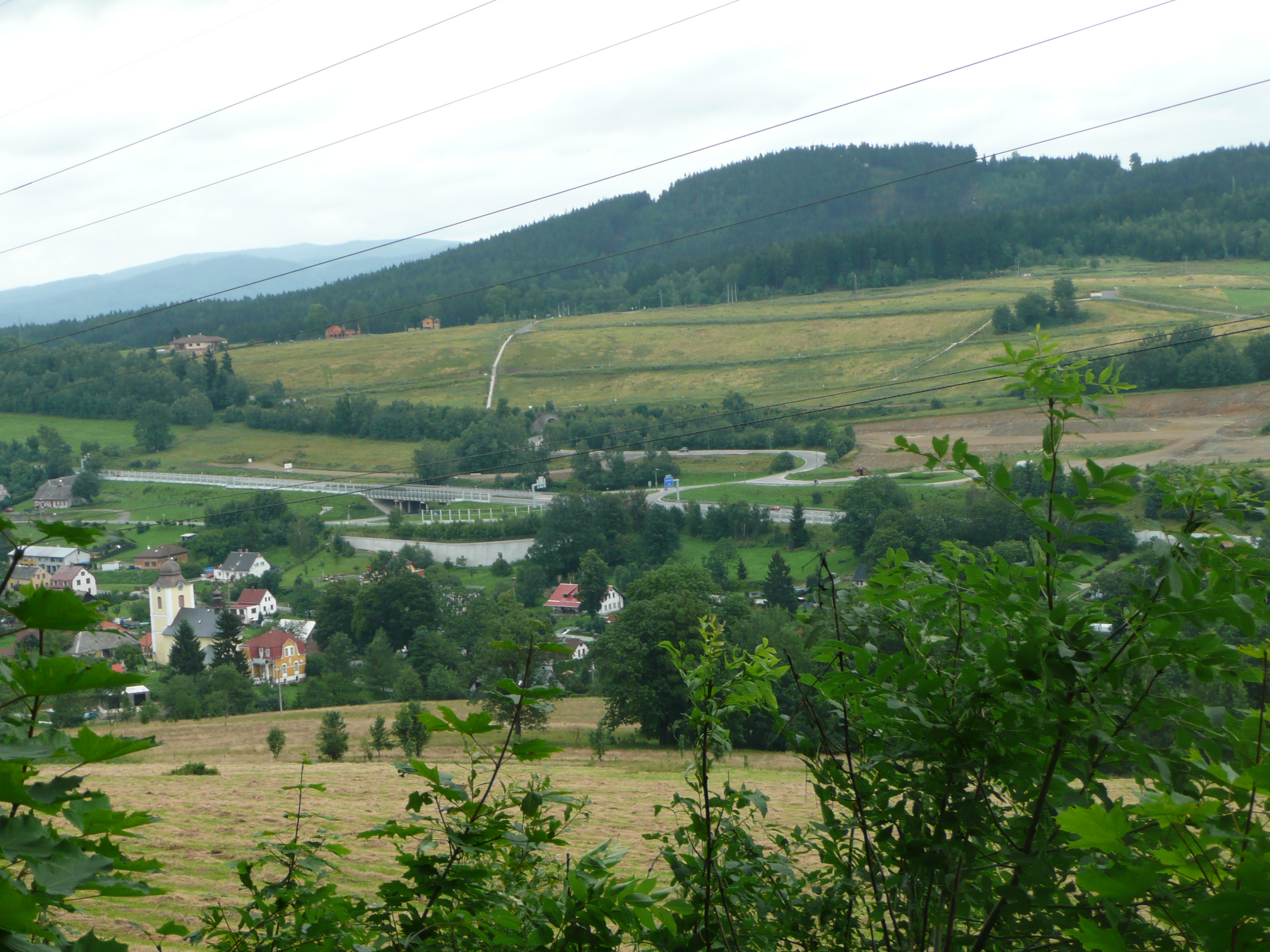 Blick auf Jermanice vom Javornik aus